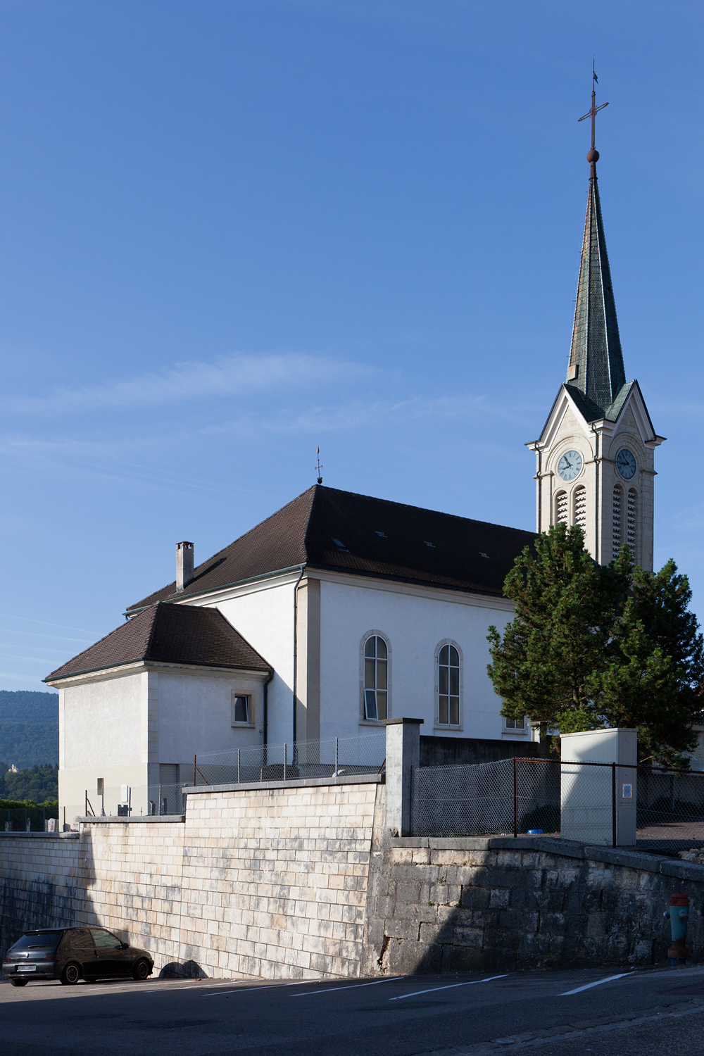 Eglise Saint-Martin à Courtedoux (JU)